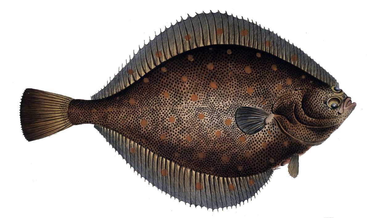 Pleuronectes platessa